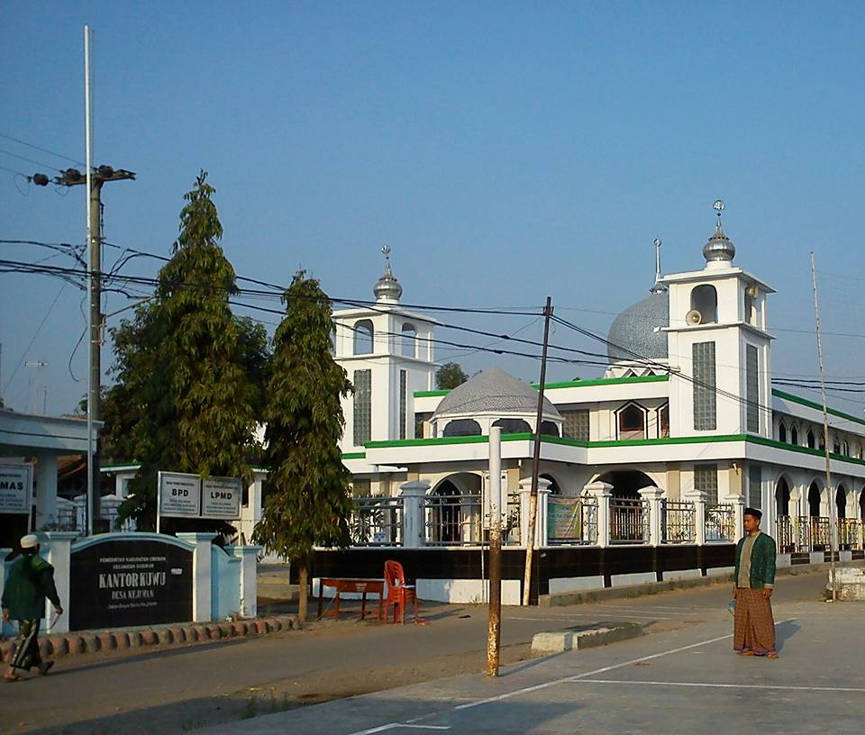 Masjid Jami At-Taubah